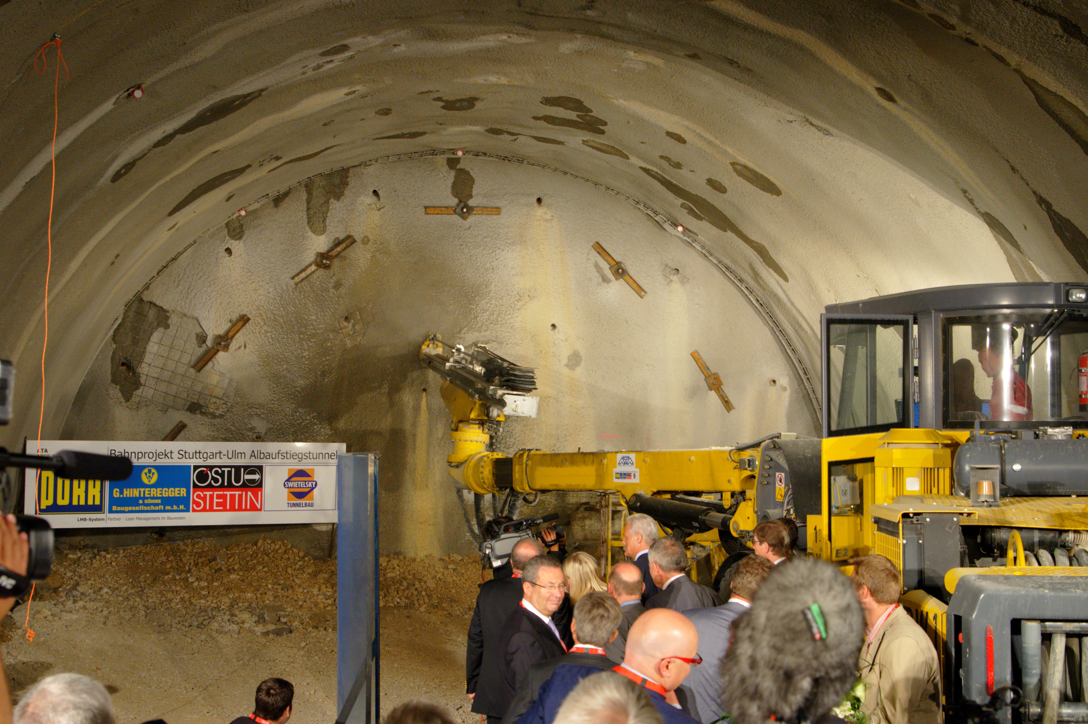 Anschlagfeier des Steinbühltunnels, Symbolischer Anschlag